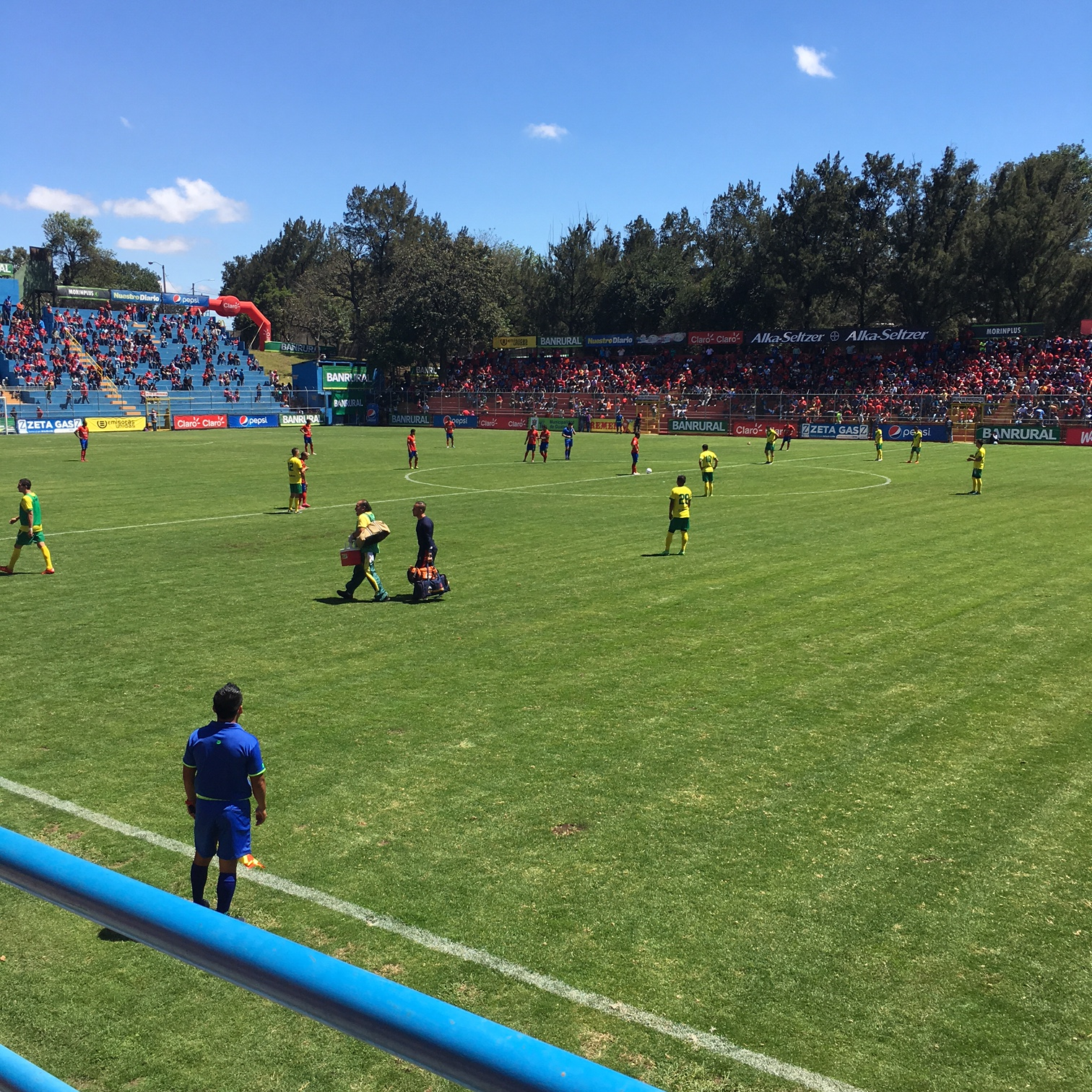 Inicio del segundo tiempo del Juego Municipal vs. Petapa en el Estadio Manuel Felipe Carrera.